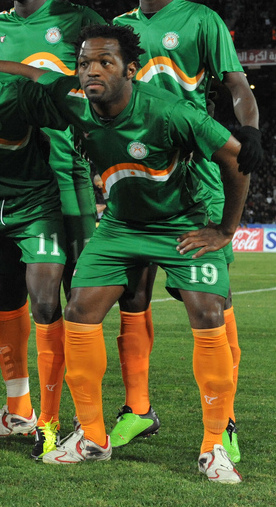 équipe du Niger en 2011